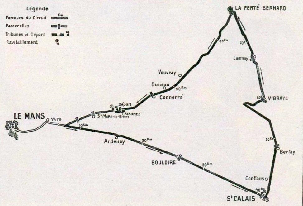 Grand Prix de l'ACF 1906 - le circuit.